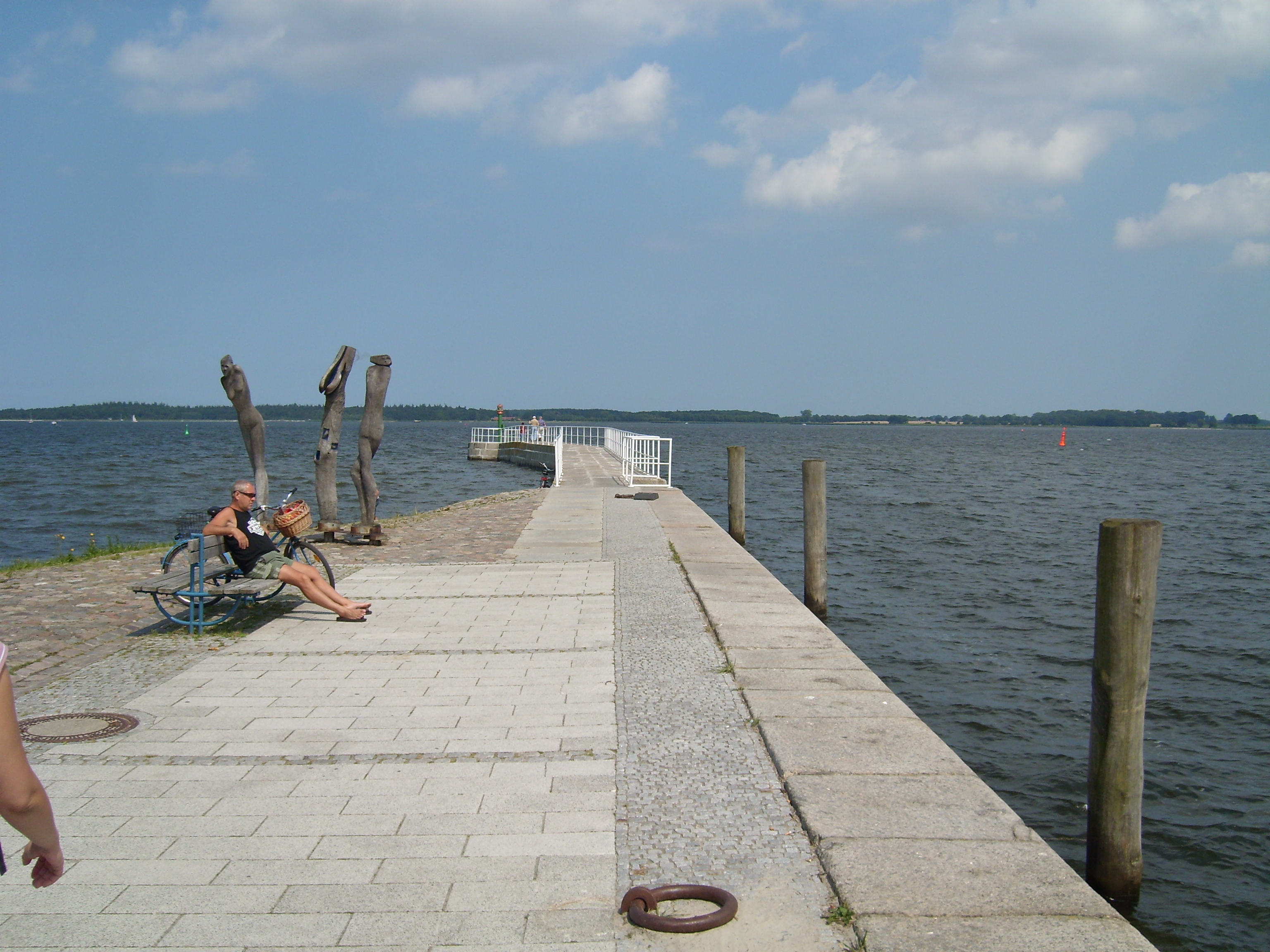 Greifswalder Bodden an der Mole in Greifswald/Wieck im Sommer 2007